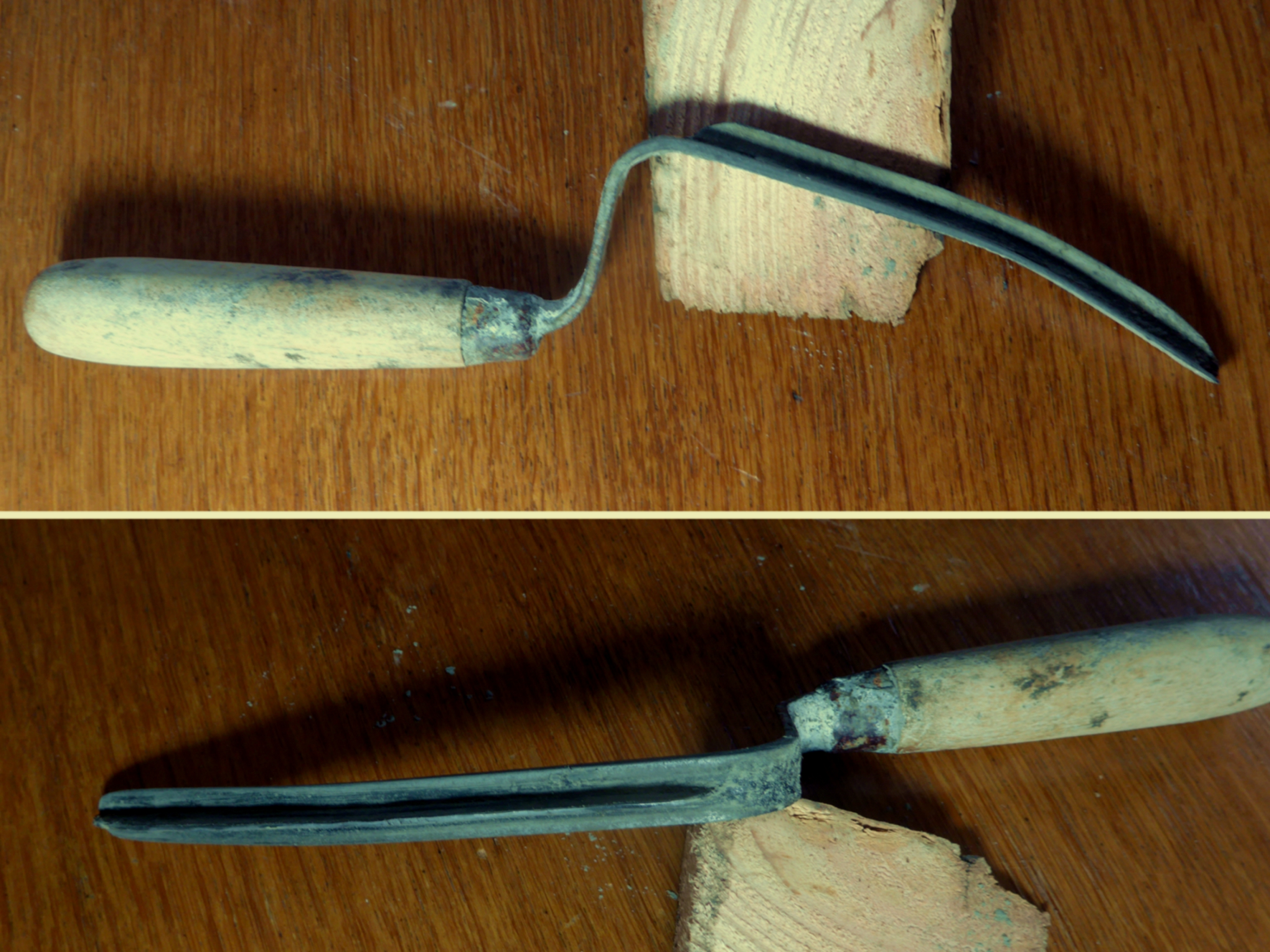 Metselgereedschap, dagge